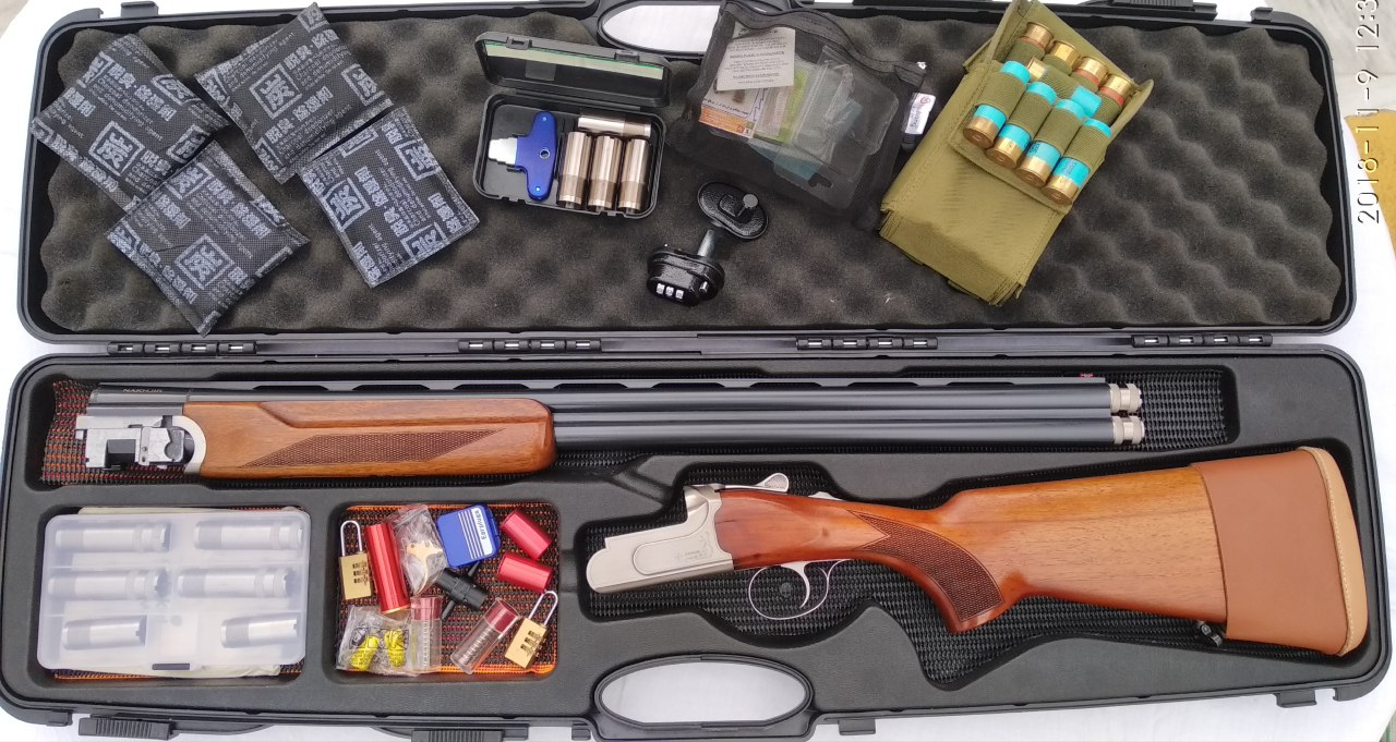 اسلحه ساچمه زنی دولول رویهم یا سوار